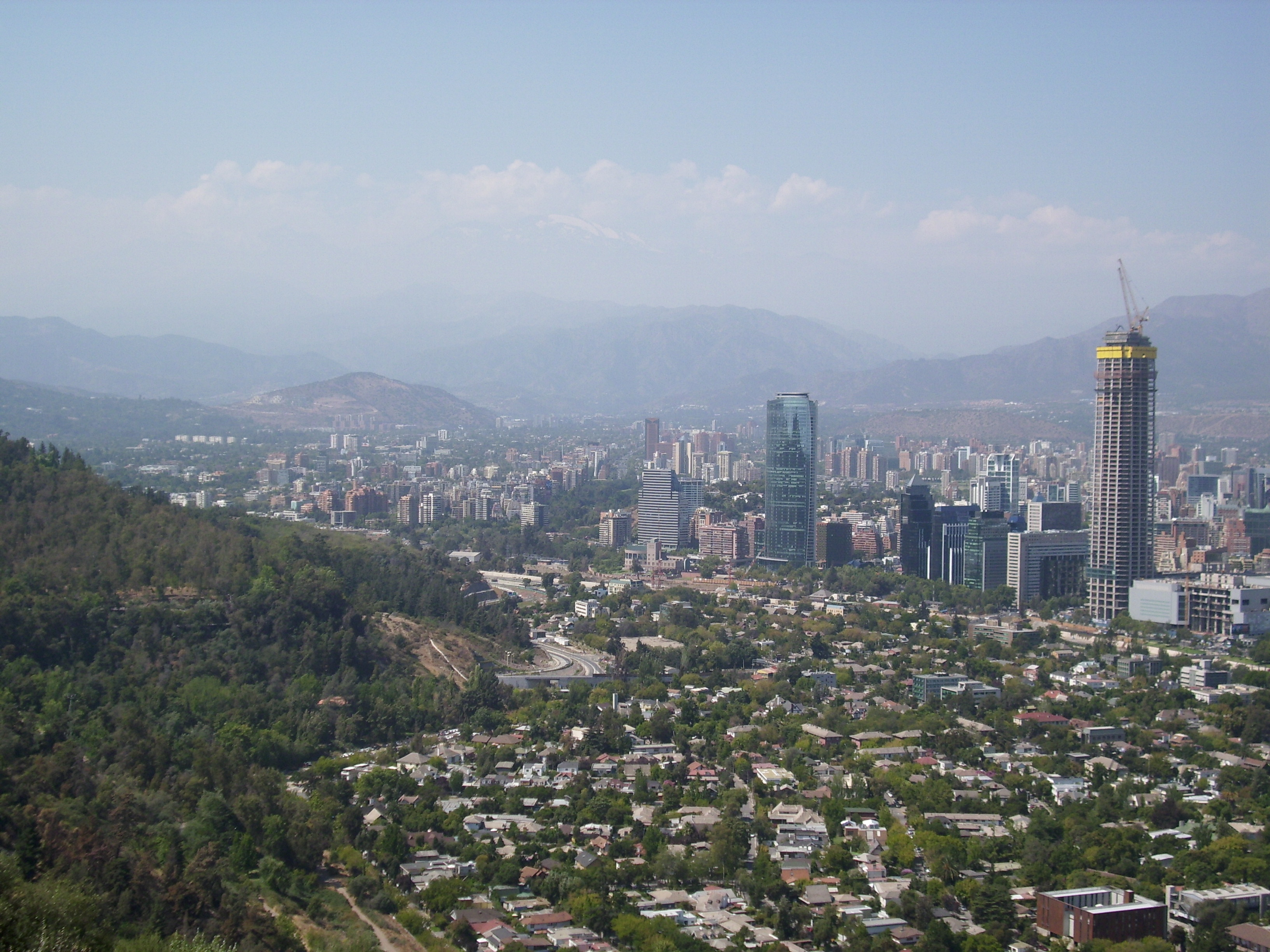 El barrio Pedro de Valdivia Norte visto desde la avenida Pedro Bannen (Cerro San Cristóbal). En la imagen se aprecian también los rascacielos Titanium La Portada y Torre Gran Costanera (todavía en construcción). Providencia, Santiago de Chile. 2 de marzo de 2011.